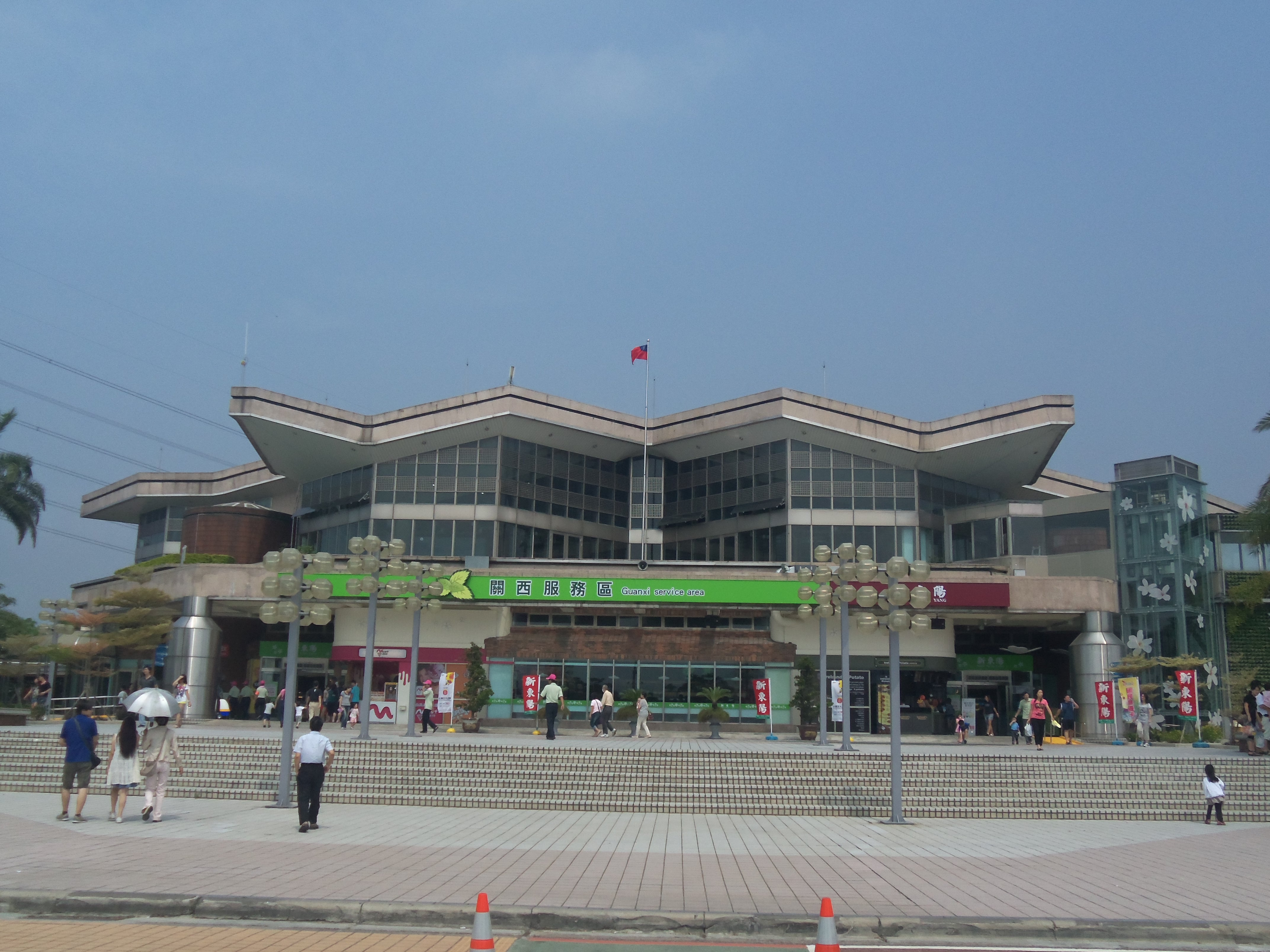 中文（台灣）: 關西服務區。